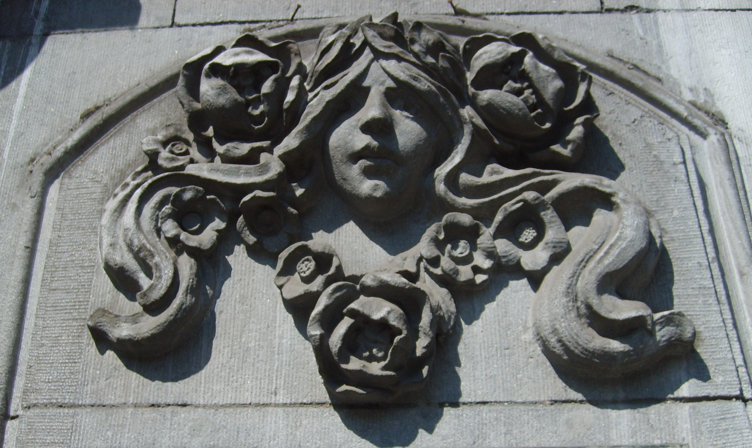 Maison Meyers Bd de l'Est, 16 Liège sculpture